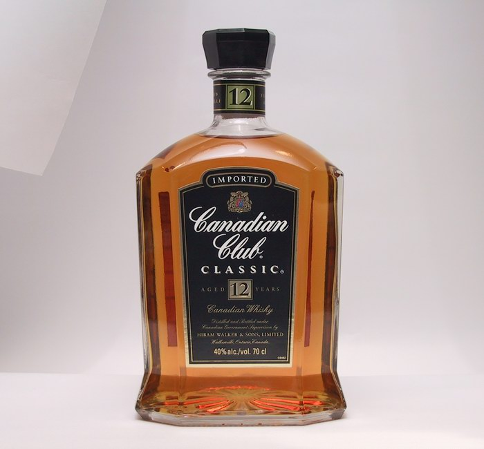 加拿大威士忌 雖然傳統上加拿大威士忌大都以無年份標示的款式為主，但近年來為了因應國際市場的需求，也開始推出高年份的陳年加拿大威士忌。 加拿大會所(Canadian Club)是一款由zh:海蘭•沃克(Hiram Walker)酒廠生產的加拿大威士忌，與zh:西格拉姆(Seagram)並列加拿大地區最大的烈酒生產廠。 本圖片由上傳者zh:User:SElephant拍攝於2004年7月。